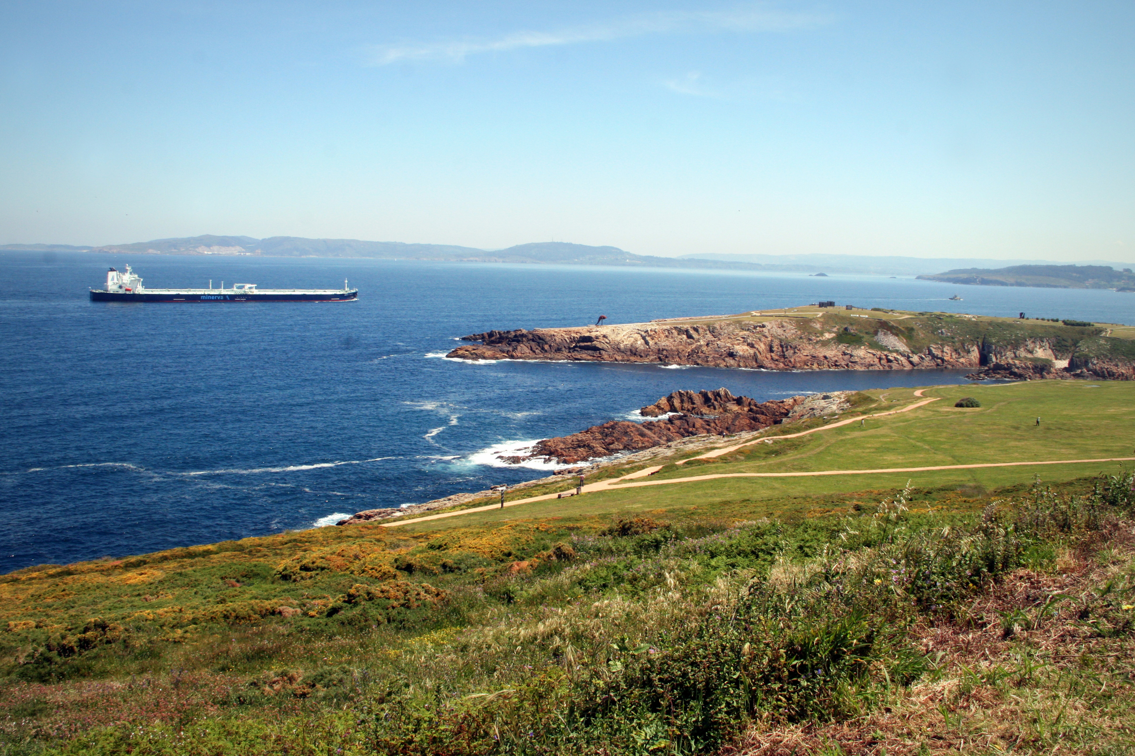 Parque da Torre de Hércules.